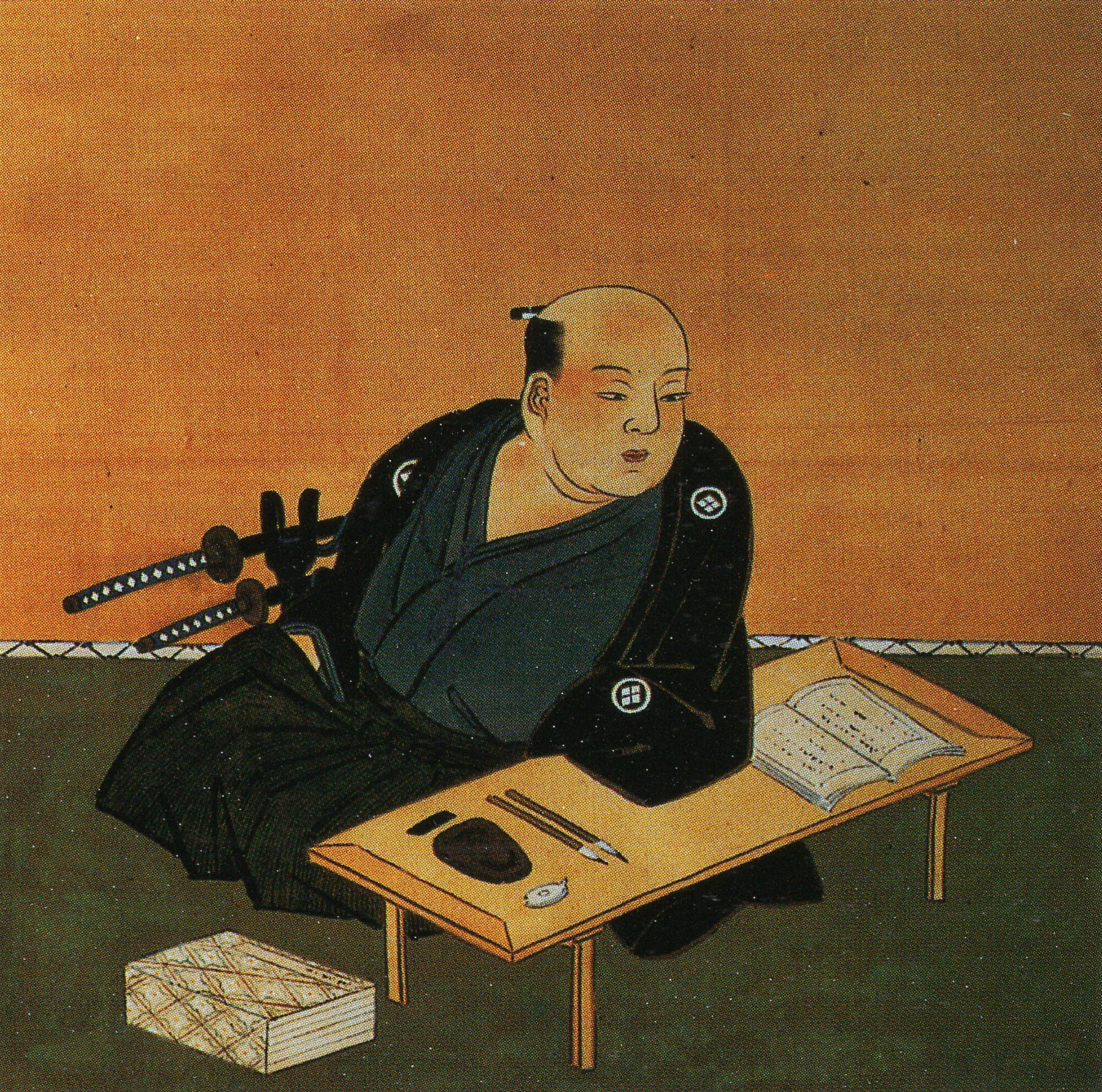 三代目戸谷半兵衛光寿の肖像。